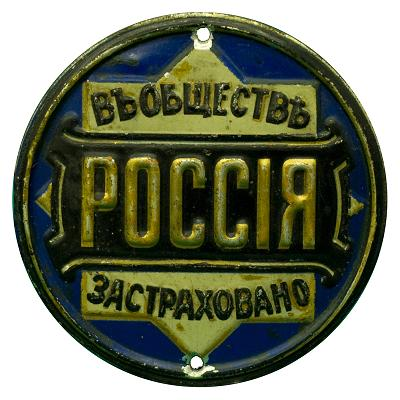 Изображение страховой доски начала ХХ века страховой компании Россия